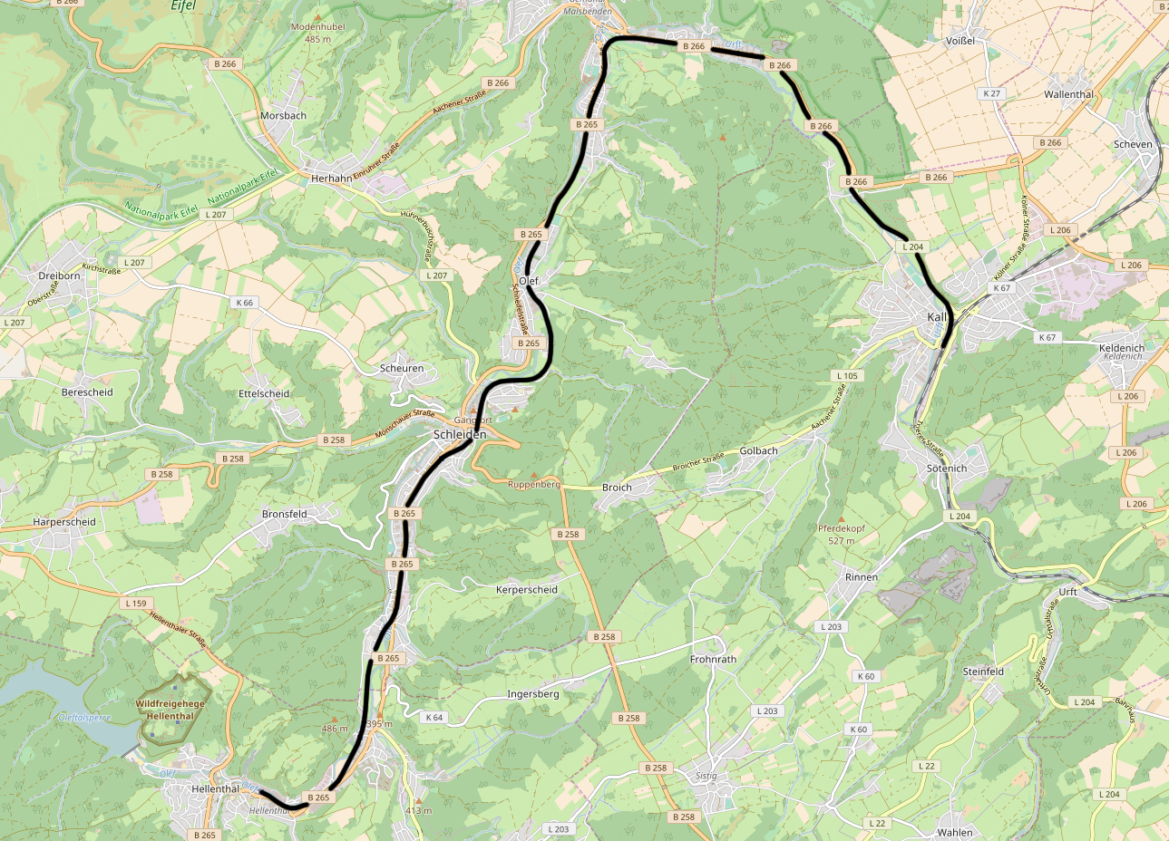 DB 2635, Kall - Hellenthal